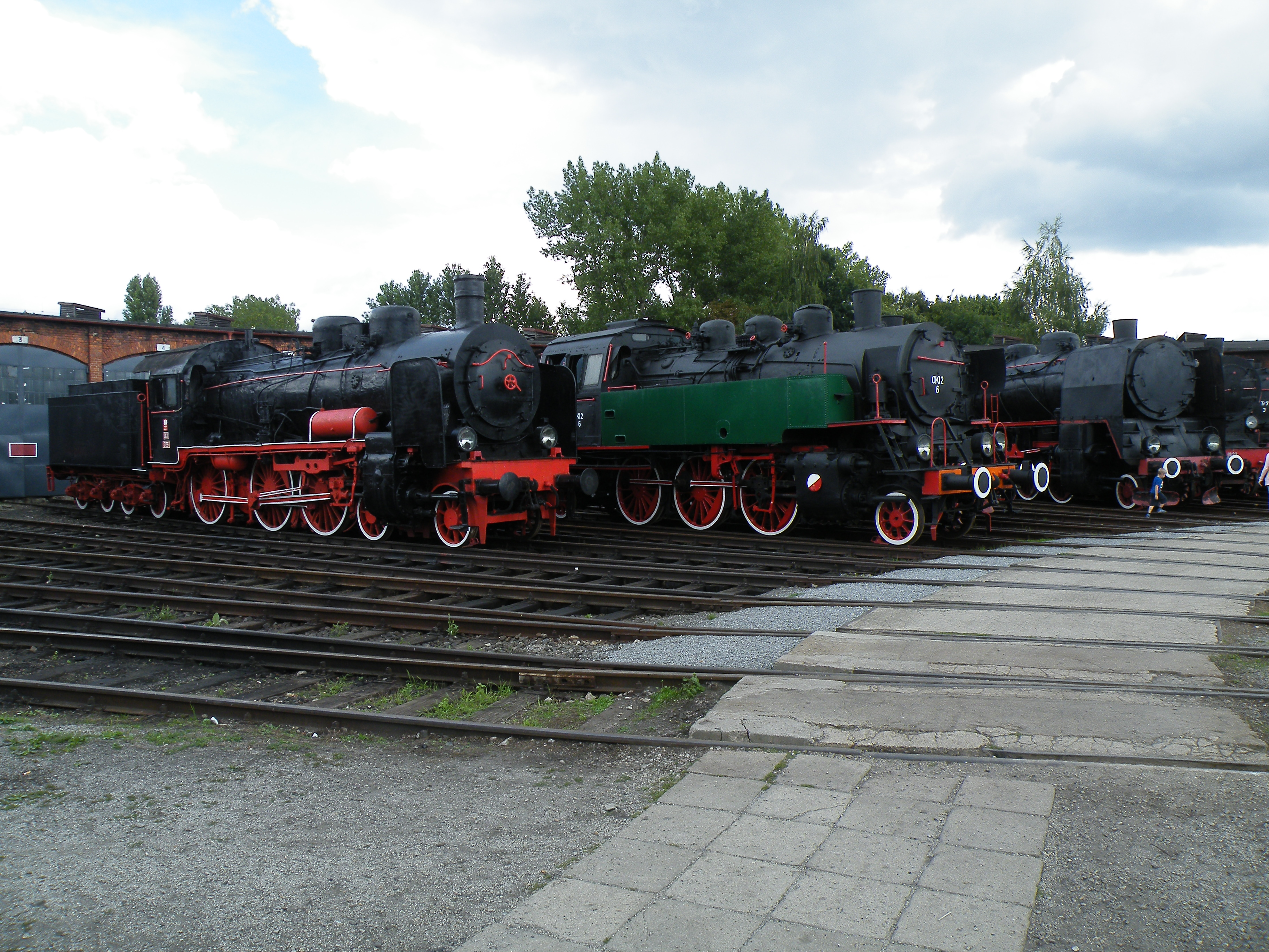 Parowozy Ok1-325, OKl2-6 i Ty42-20 w Muzeum Przemysłu i Kolejnictwa na Śląsku w Jaworzynie Śląskiej